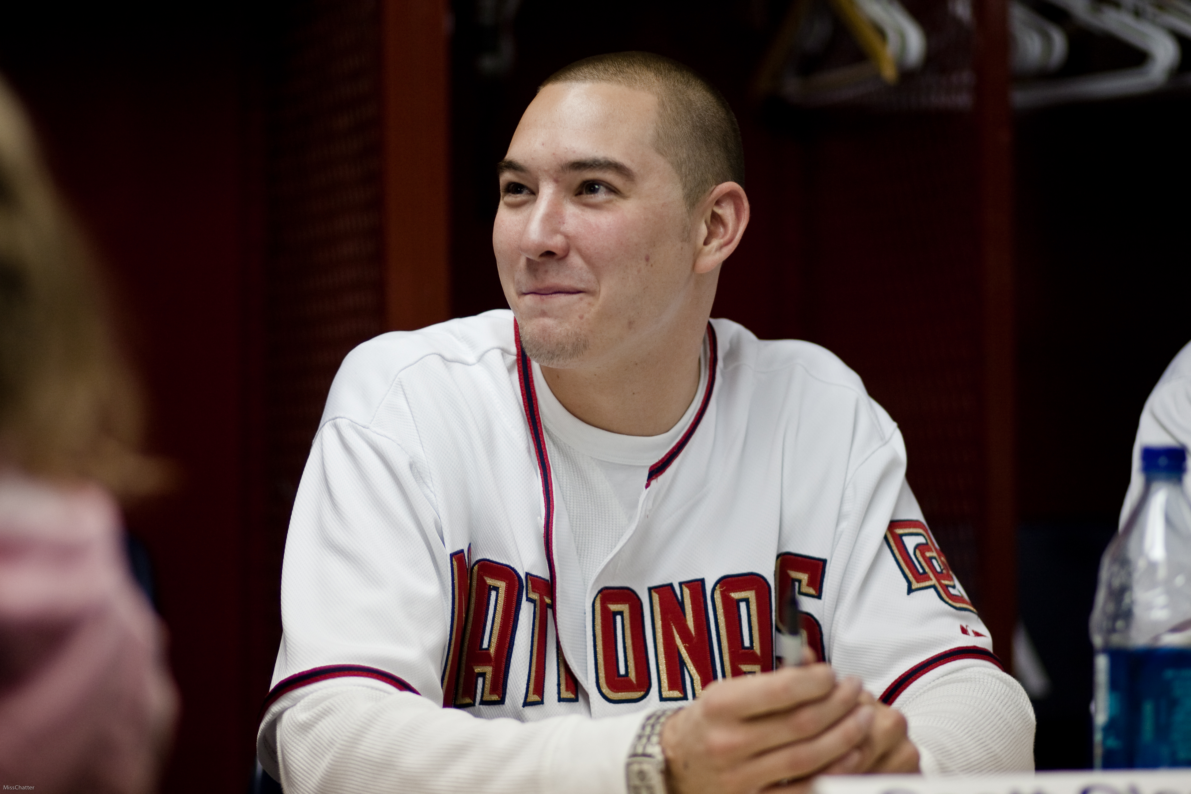 Scott Olsen